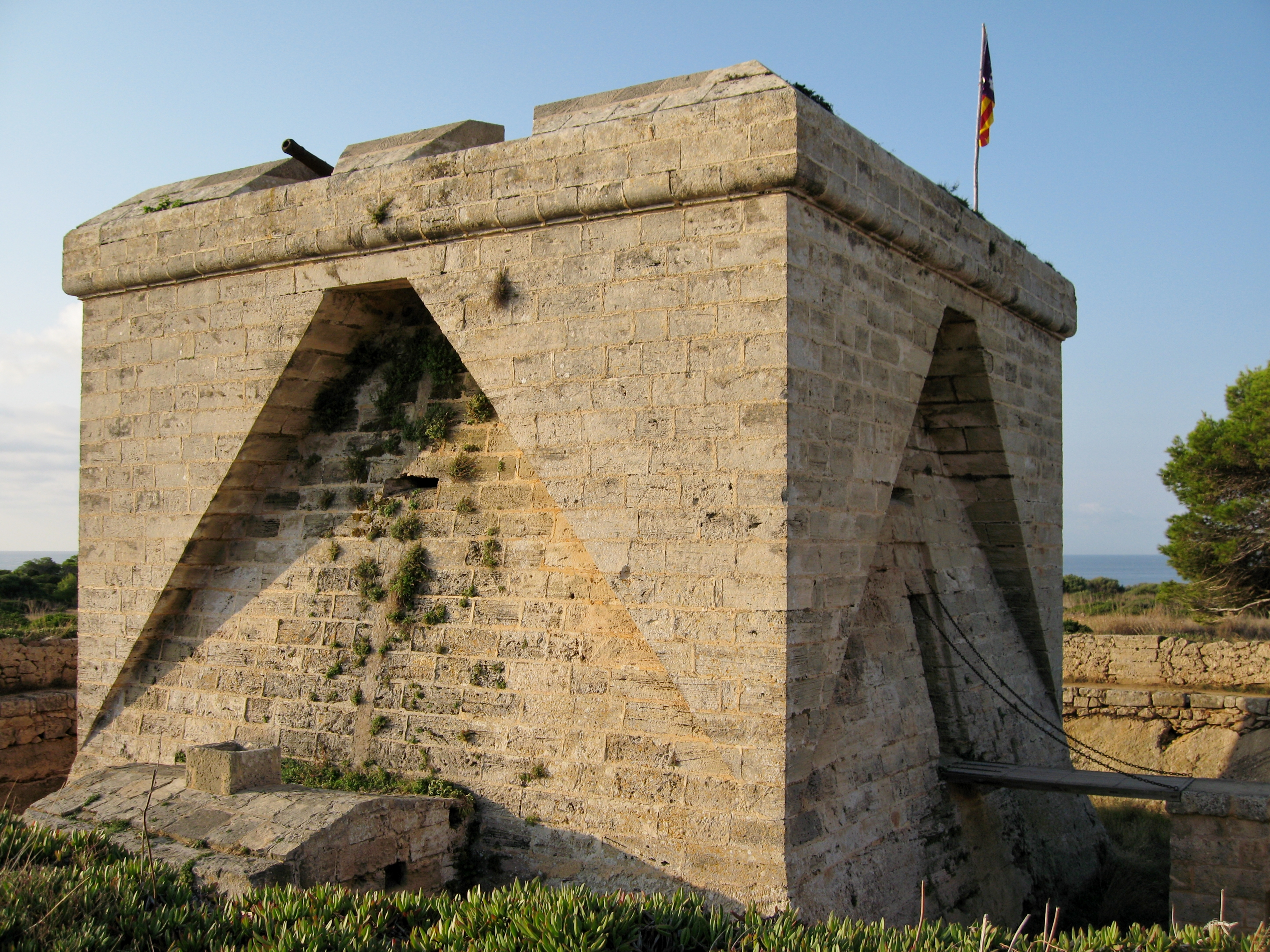 Es Castell de Sa Punta de n'Amer, Sant Llorenç des Cardassar, Mallorca, Spain